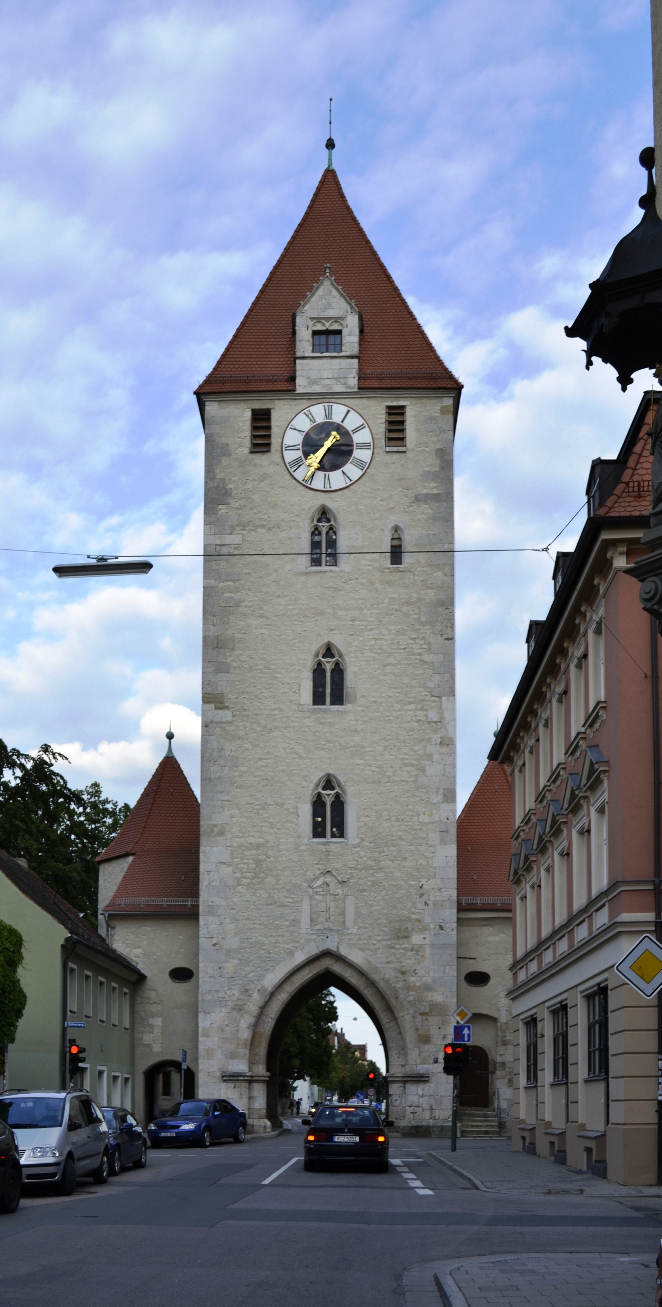 Das Ostentor in Regensburg.